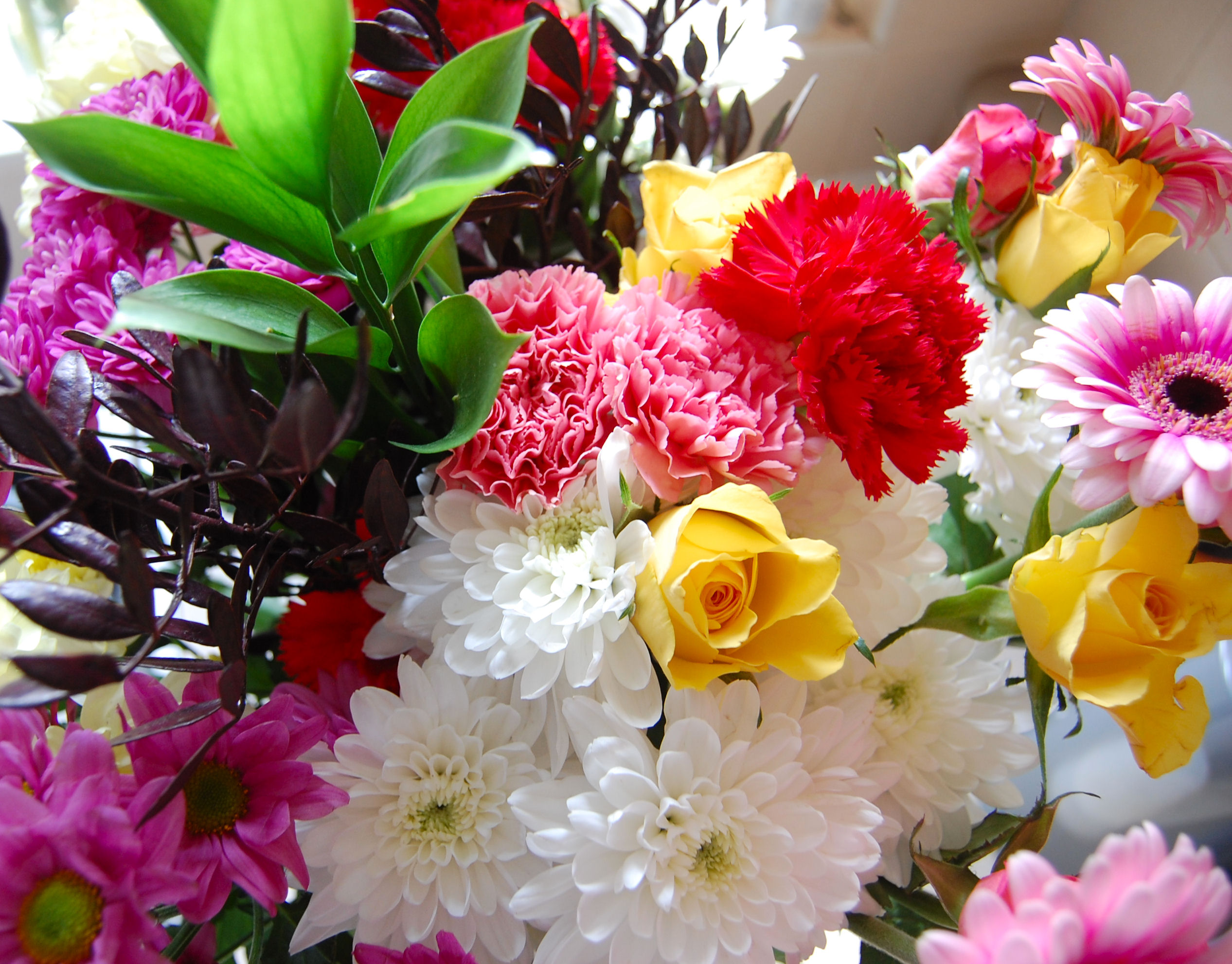 BEAUTIFUL BLOOMS..